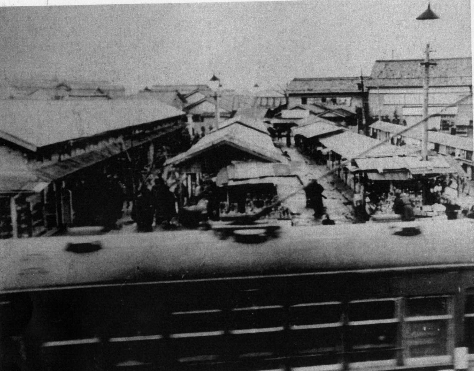 昭和24年当時の富山駅前の闇市